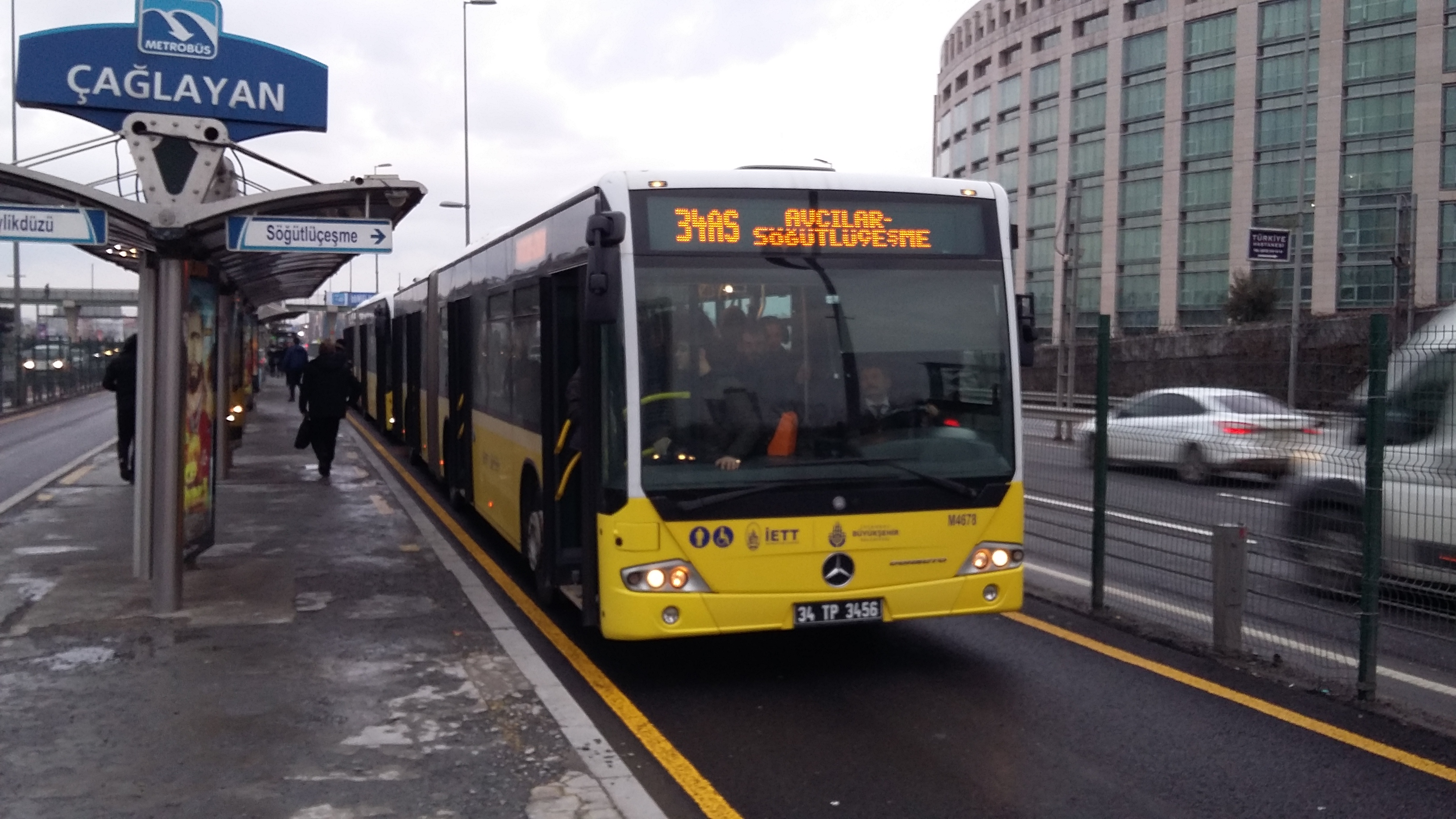 ÇAĞLAYAN